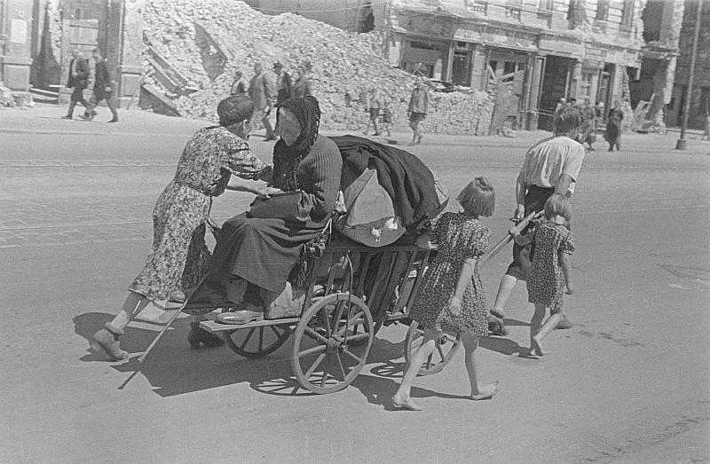 Original image description from the Deutsche Fotothek Mann repariert Fahrradschlauch - Frauen holen Wasser am Brunnen auf der Straße